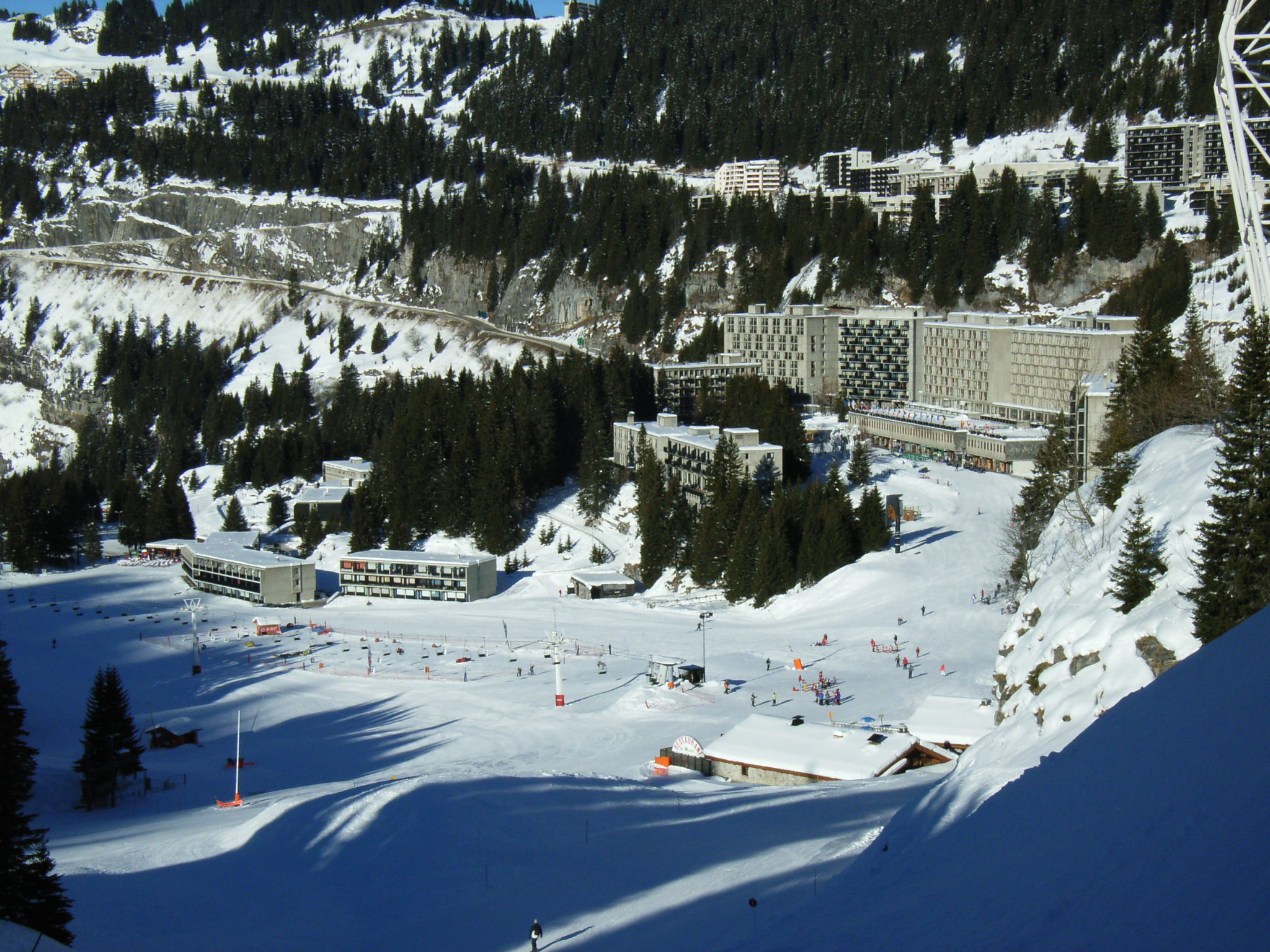 photo de la station de ski Flaine, prise le 11 janvier 2006 11h